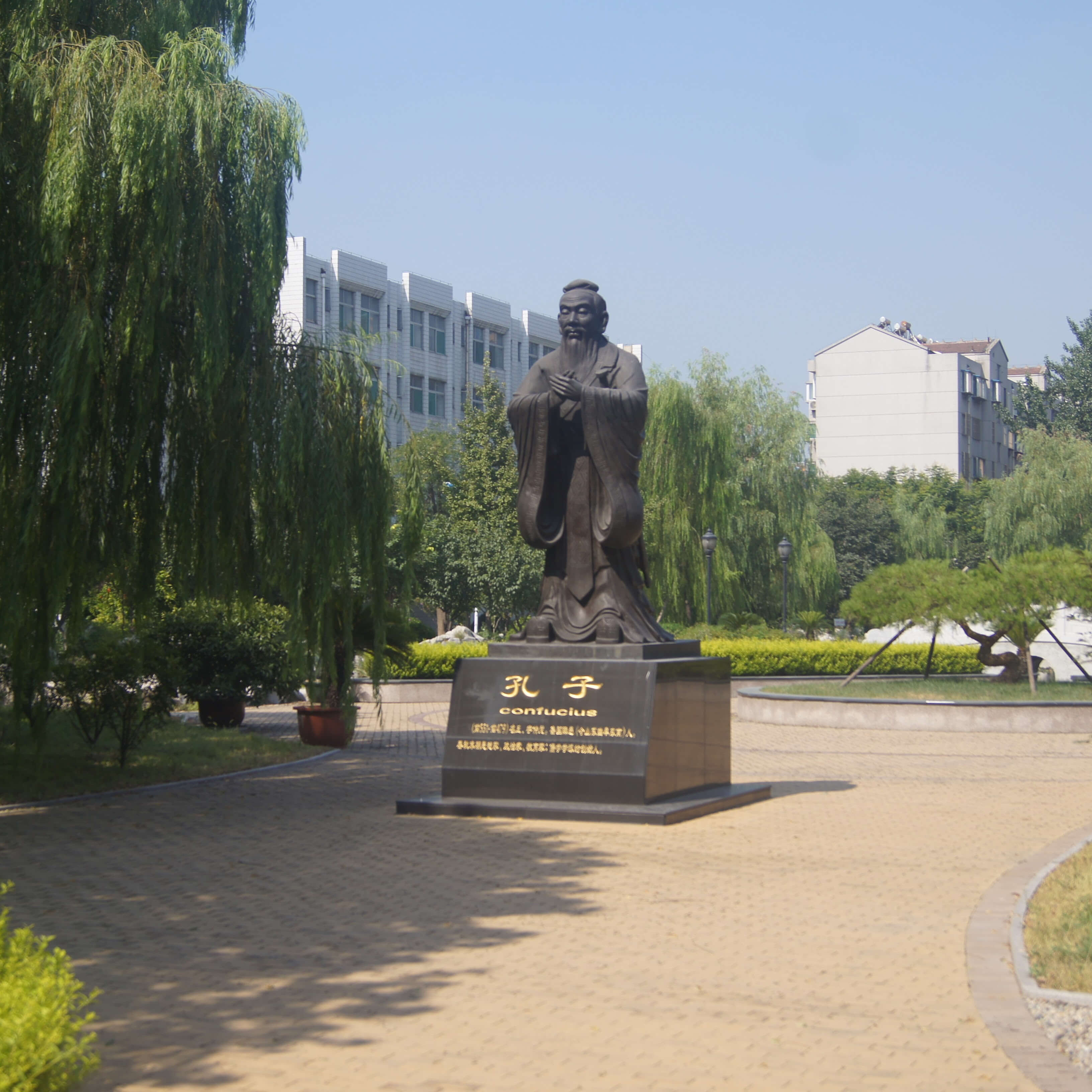 中文（中国大陆）: 淄博实验中学内的孔子像